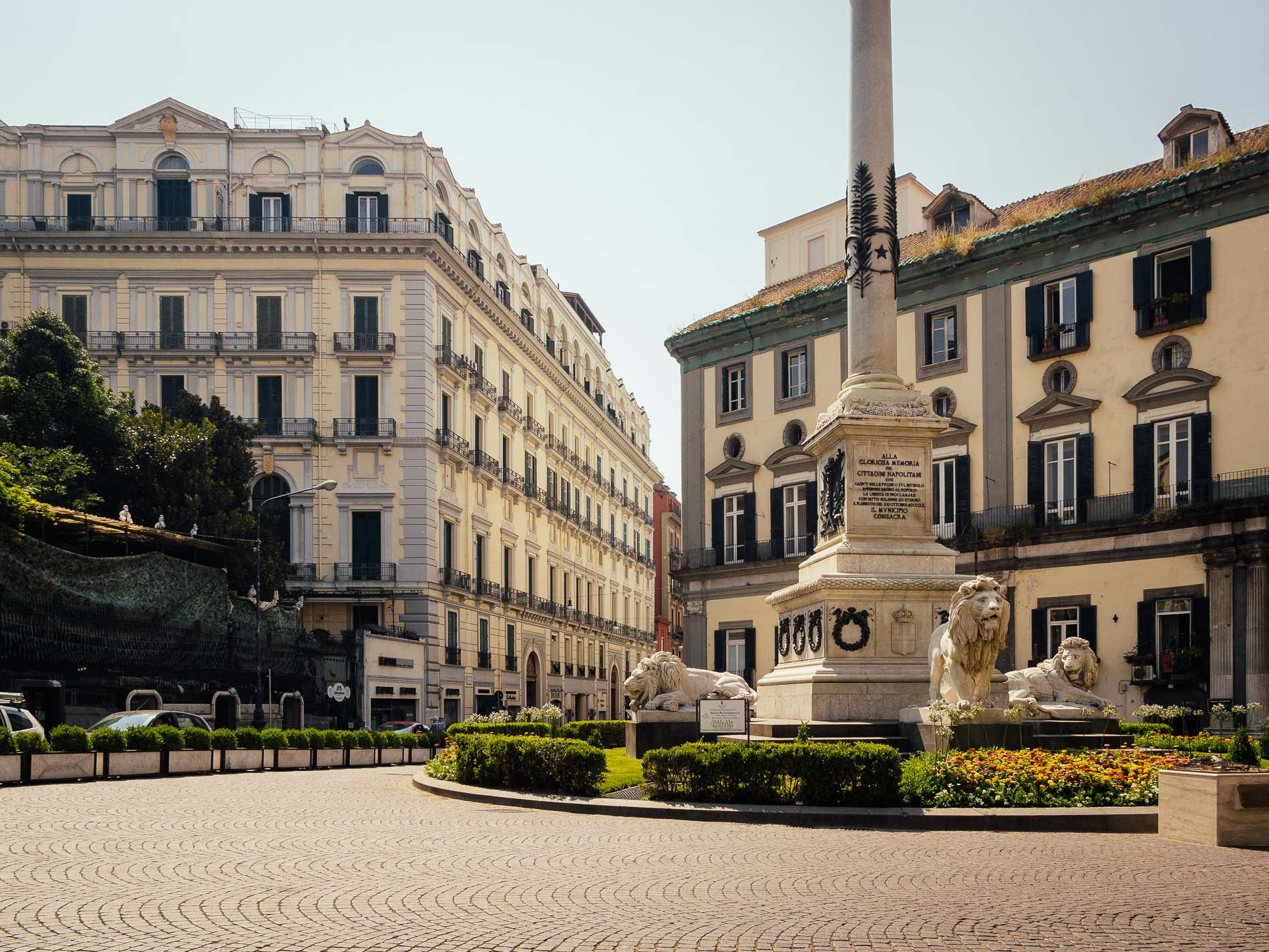 Maestoso edificio realizzato da Errico Alvino su commissione del generale Alessandro Nunziante. Chiude idealmente la quinta di Piazza dei Martiri.